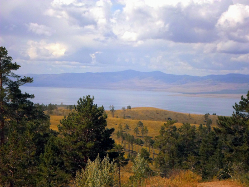 Юго-западный склон хребта Моностой, опускающийся к Гусиному озеру. Вид с Убиенного перевала. Вдали Хамбинский хребет Хамар-Дабана.